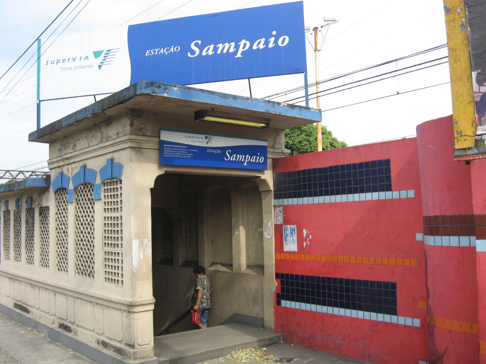 Vista da estação ferroviária de Sampaio, no subúrbio do Rio de Janeiro (capital).